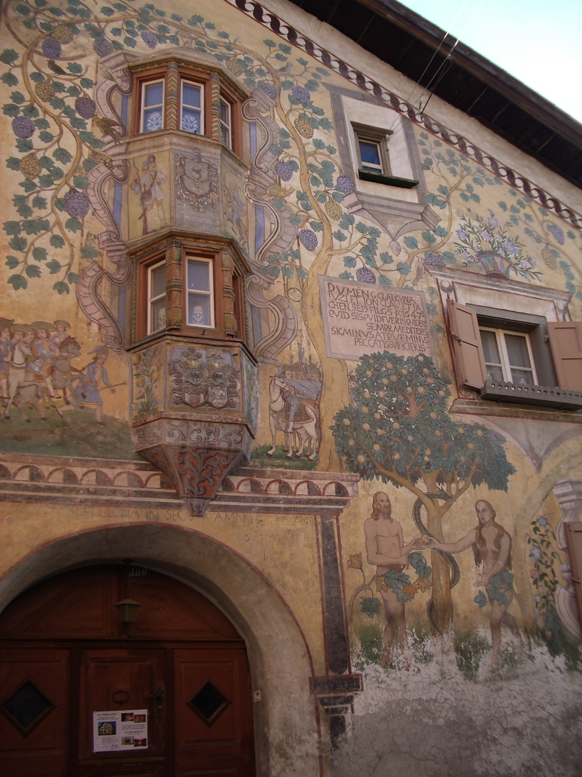 Ardez GR, Switzerland self-made, September 2006